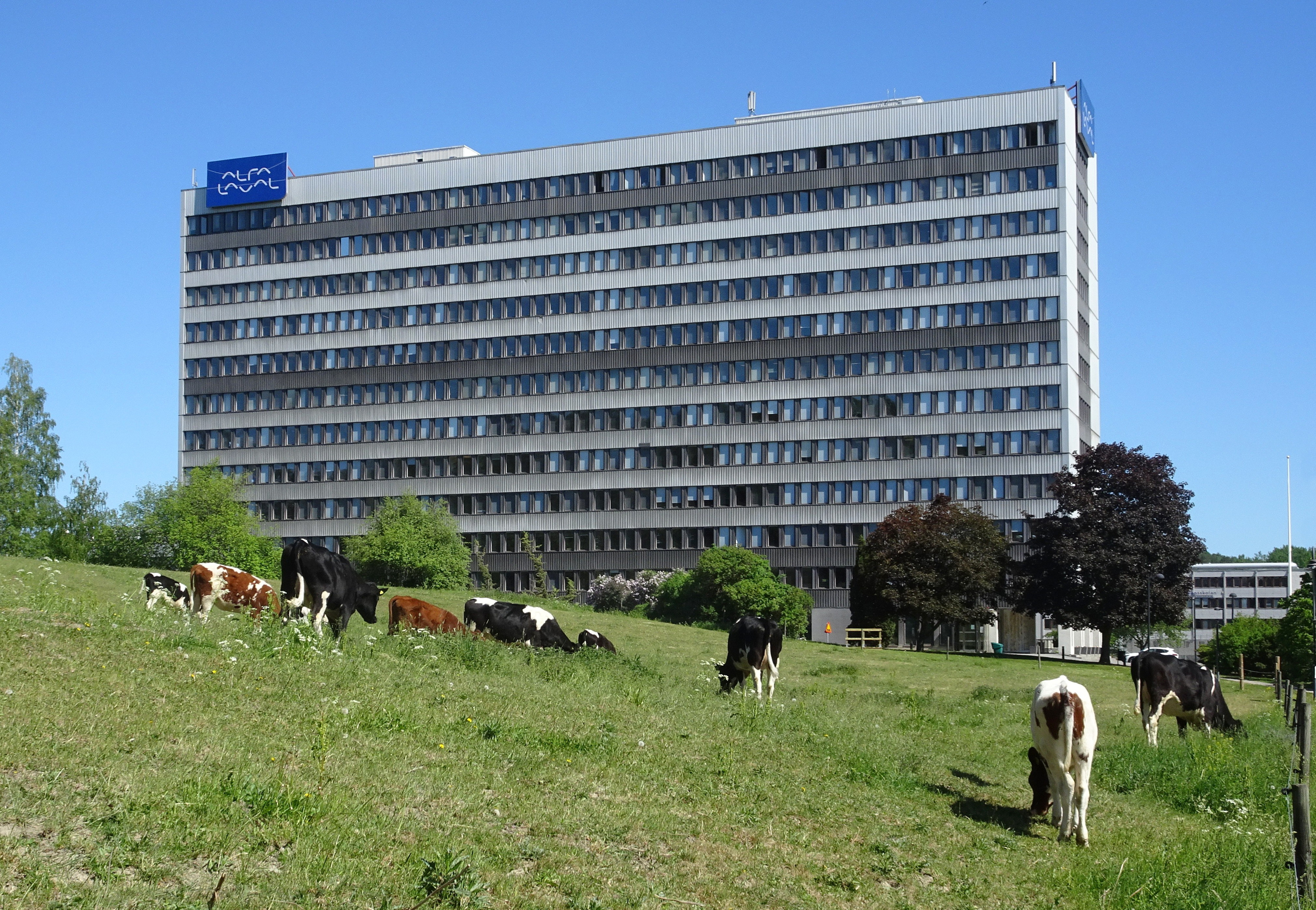 Alfa Lavals Tumba-kontor, arkitekt Lars Carlsson